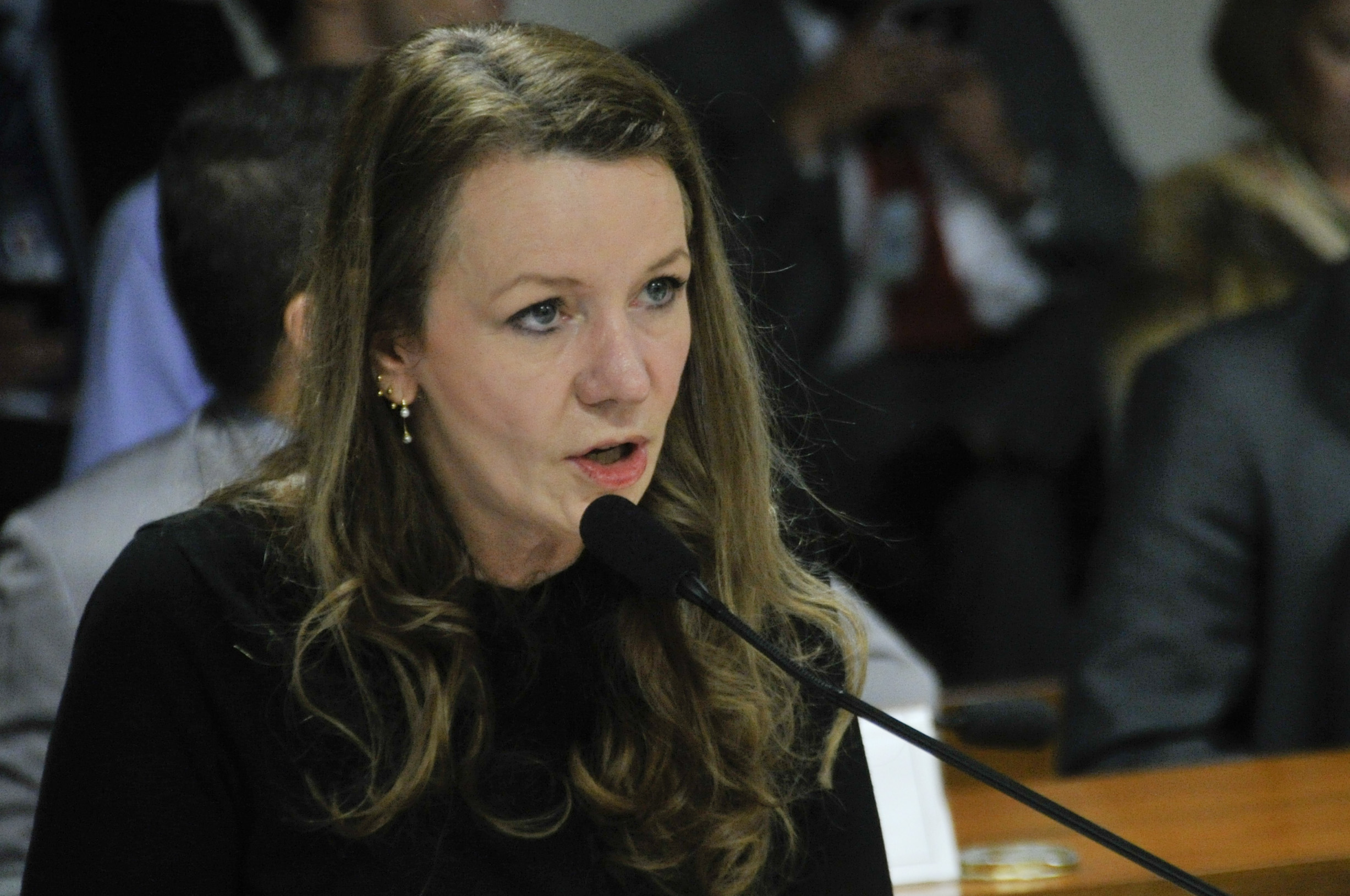 Sala de comissões do Senado Federal durante reunião da Comissão de Assuntos Sociais (CAS). Deliberativa com 10 itens. Entre eles, o PLC 52/2011, sobre a reserva de habitações para idosos de baixa renda nos programas oficiais de produção de moradia, e o PLS 39/2014, que institui a obrigatoriedade de reserva de vaga e espaço para o transporte de órgãos, tecidos e partes do corpo humano para fins de transplante e tratamento. Em pronunciamento, senadora Vanessa Grazziotin (PCdoB-AM). Foto: Geraldo Magela/Agência Senado